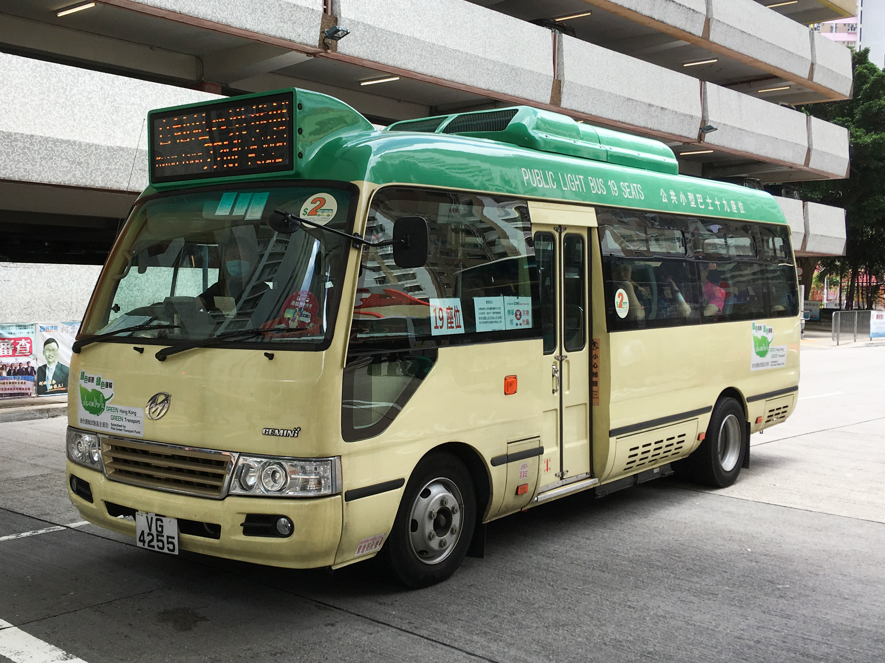 GMI Gemini